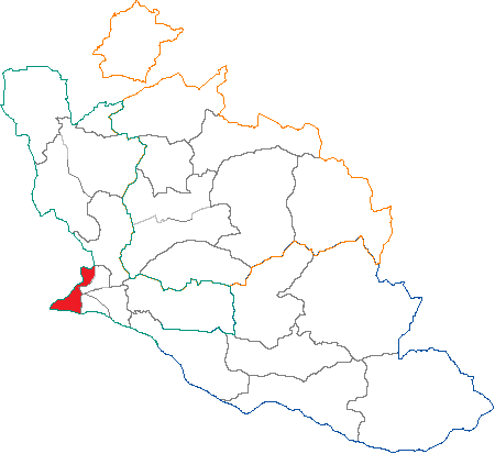 situation du canton dans le département de Vaucluse (France)